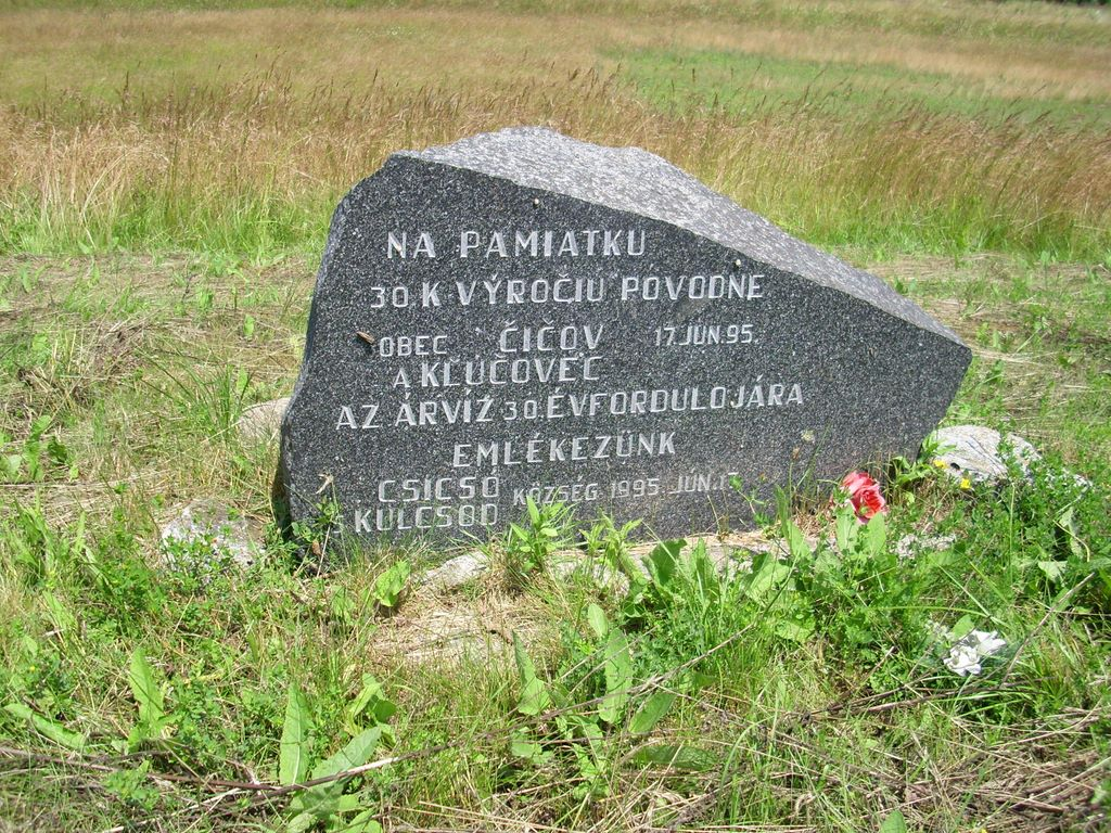 Az 1965. június 14.-i szakításra emlékező mű Kulcsodnál.